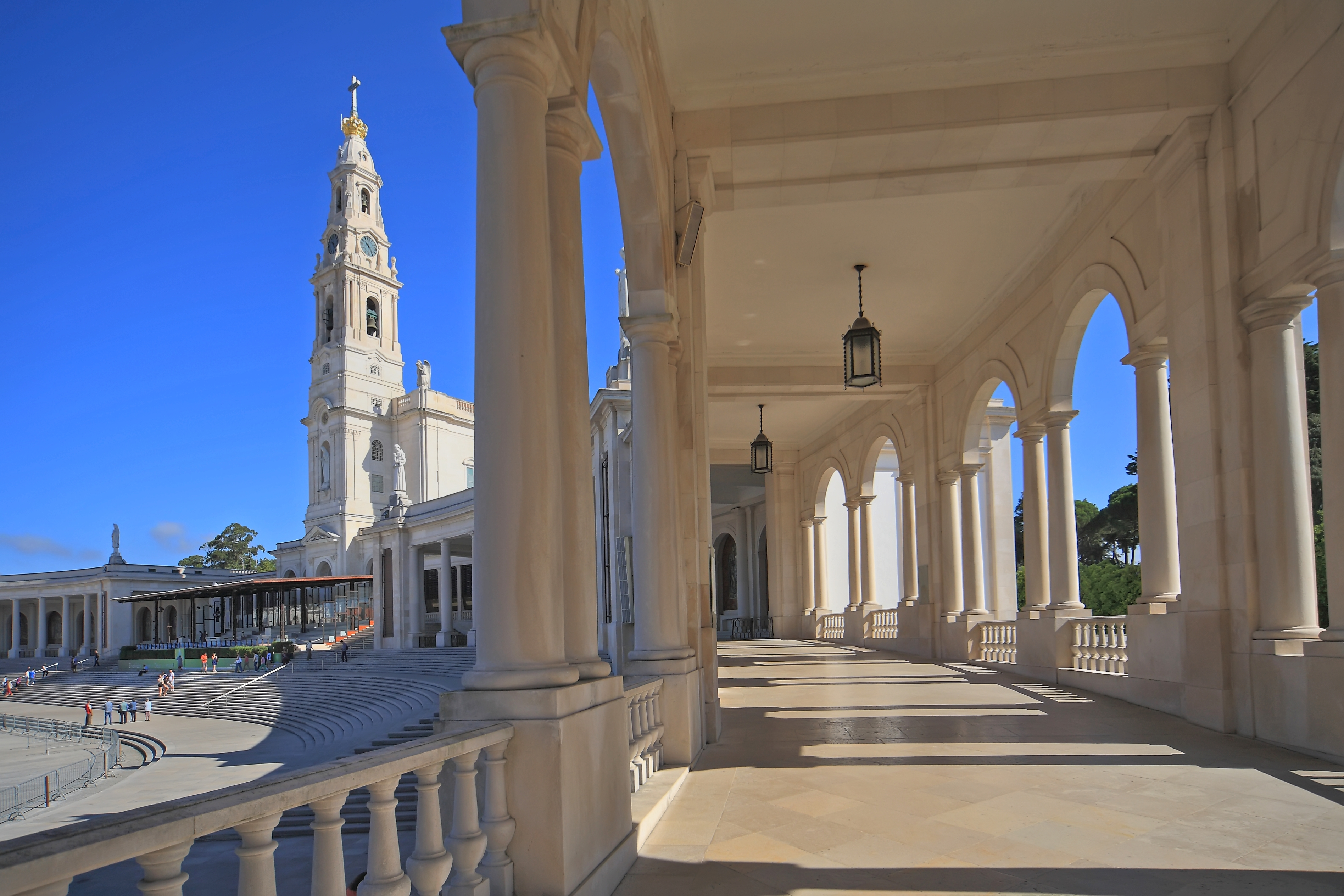 La Basílica de Nuestra Señora del Rosario, comenzó a ser construida en 1928.